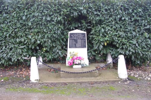 Stelle commémorative aux massacres des Tziganes, Saint Sixte